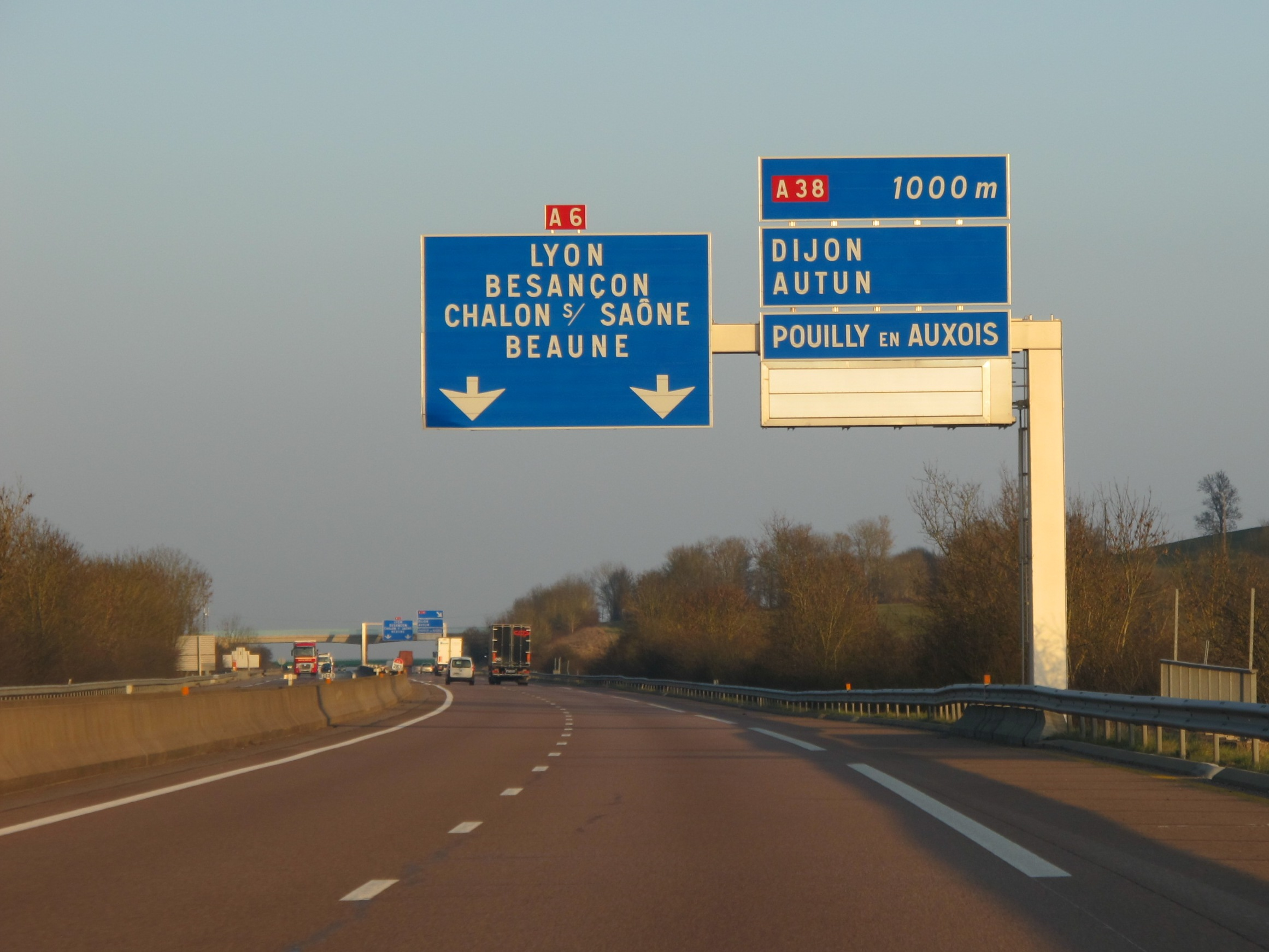 Autoroute A6 - France